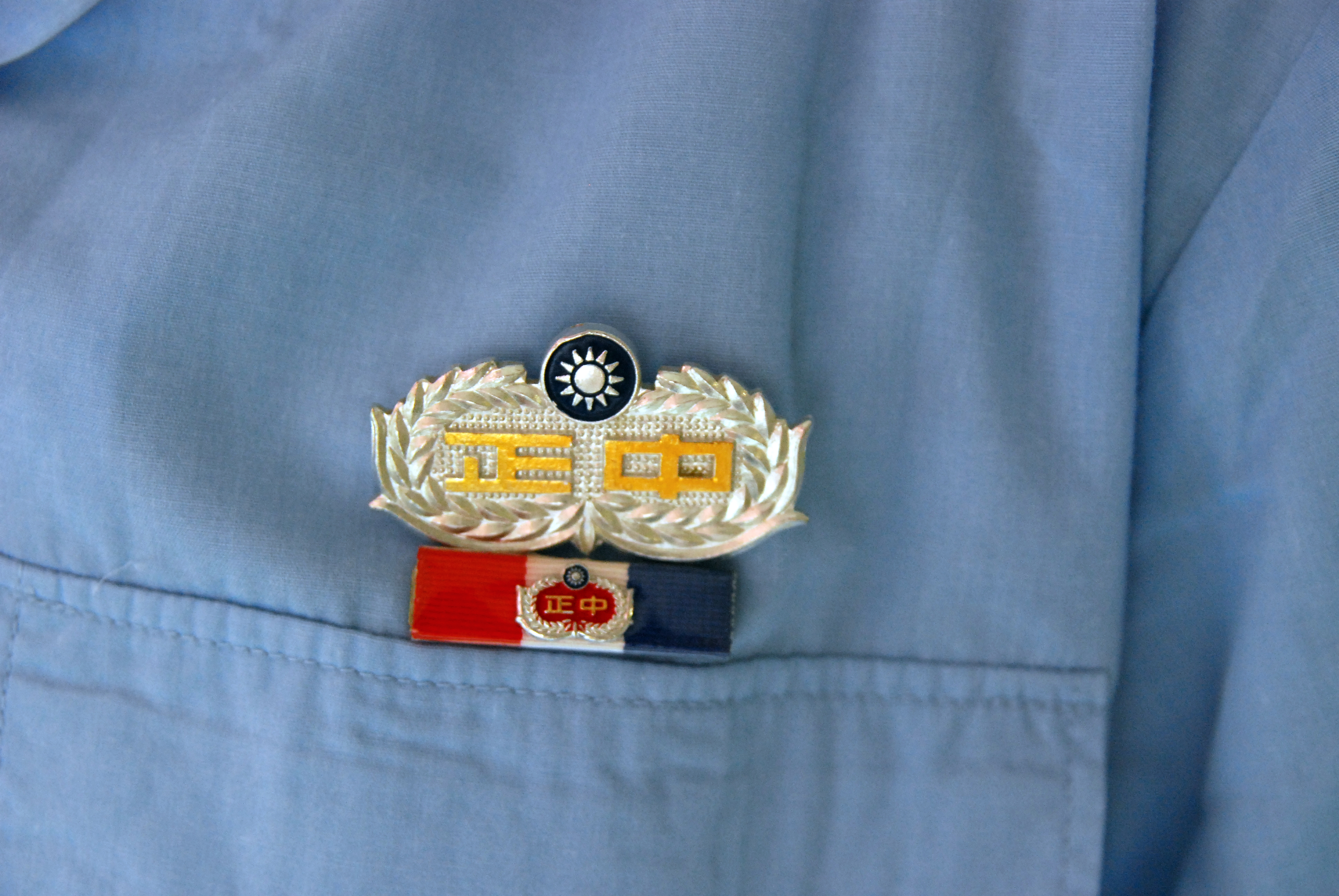 中正國防幹部預備學校制服上的校徽和榮譽徽。